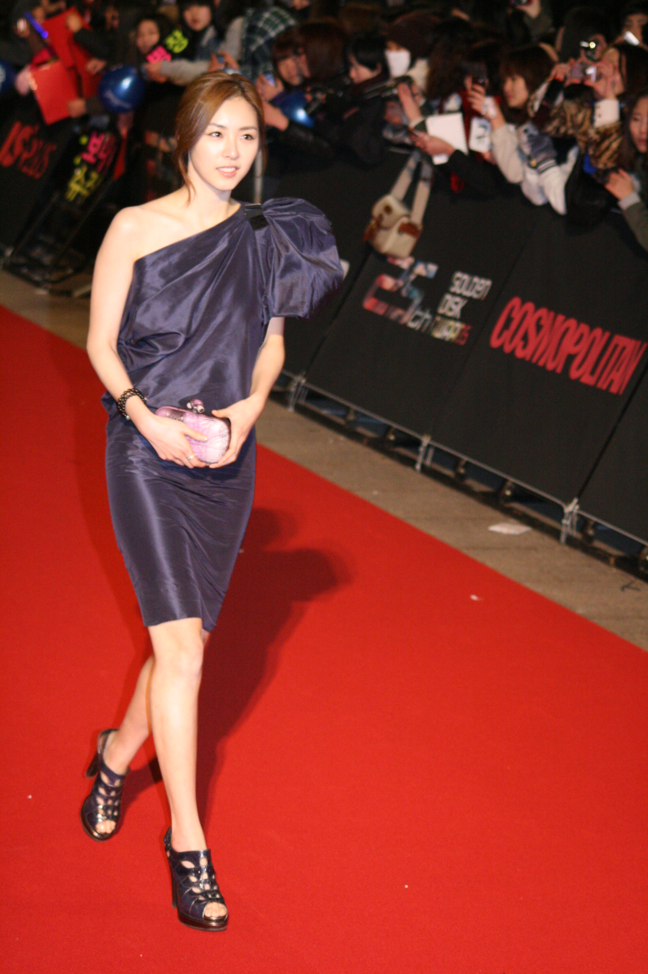 2010 골든디스크 시상식